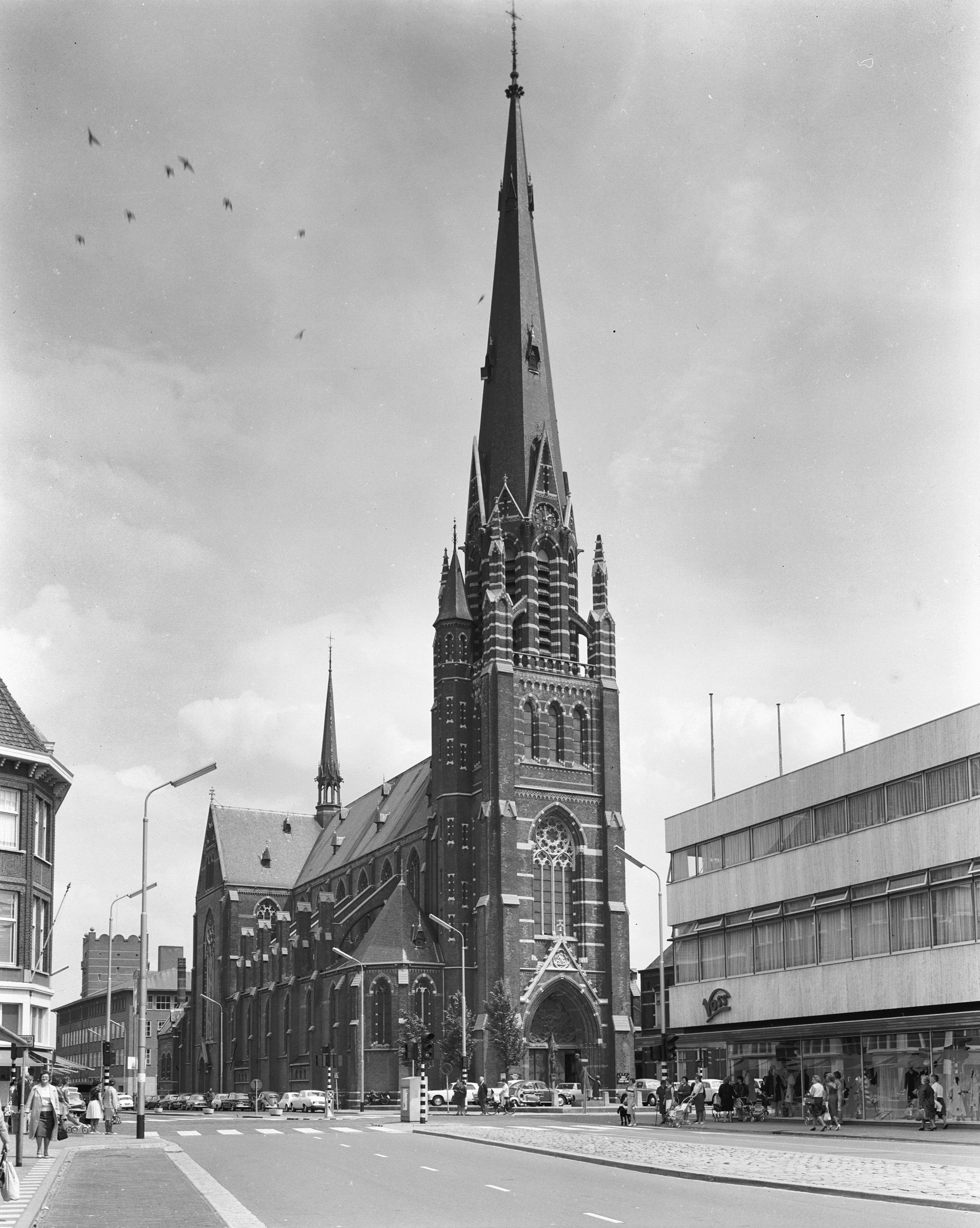 Rooms-Katholieke Kerk van Onze Lieve Vrouwe Hemelvaart: exterieur